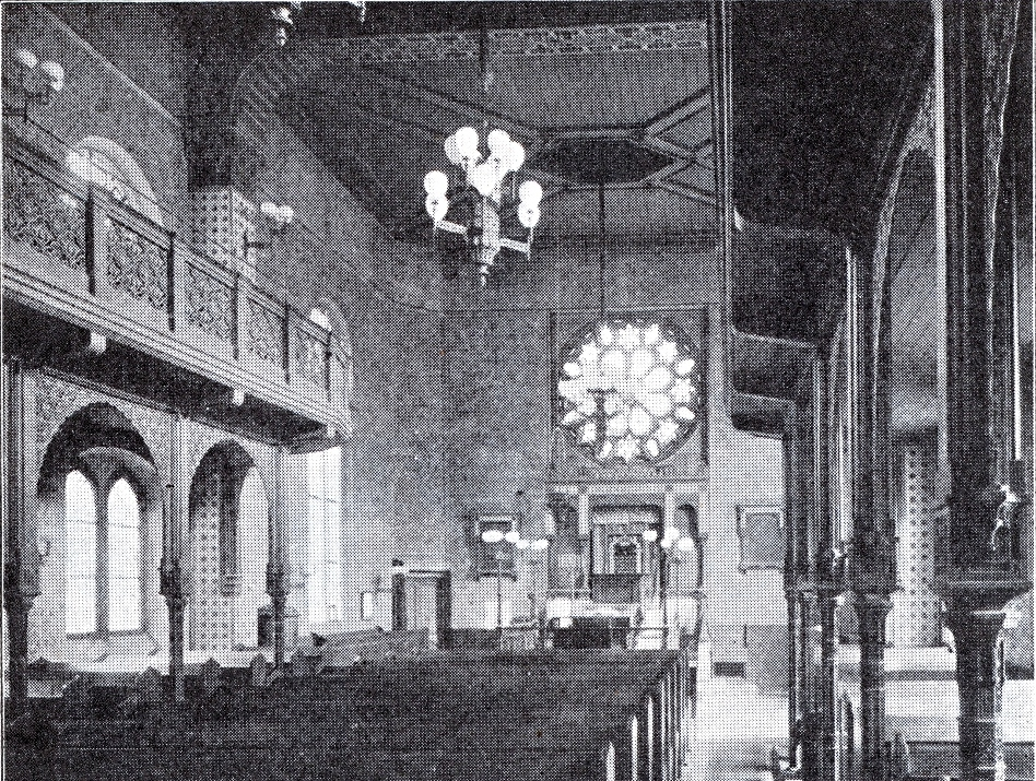 Alte Synagoge Düsseldorf, Kasernenstraße, erbaut 1792 von Peter Joseph Krahe, umgebaut und erweitert 1873 bis 1875 von Deckers und Kuhne im maurischen Stil, Innen.